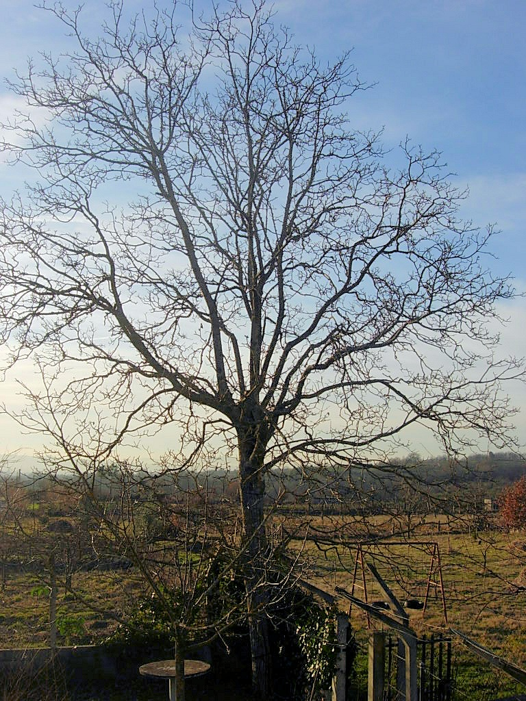 Un nogal de más de cien años.